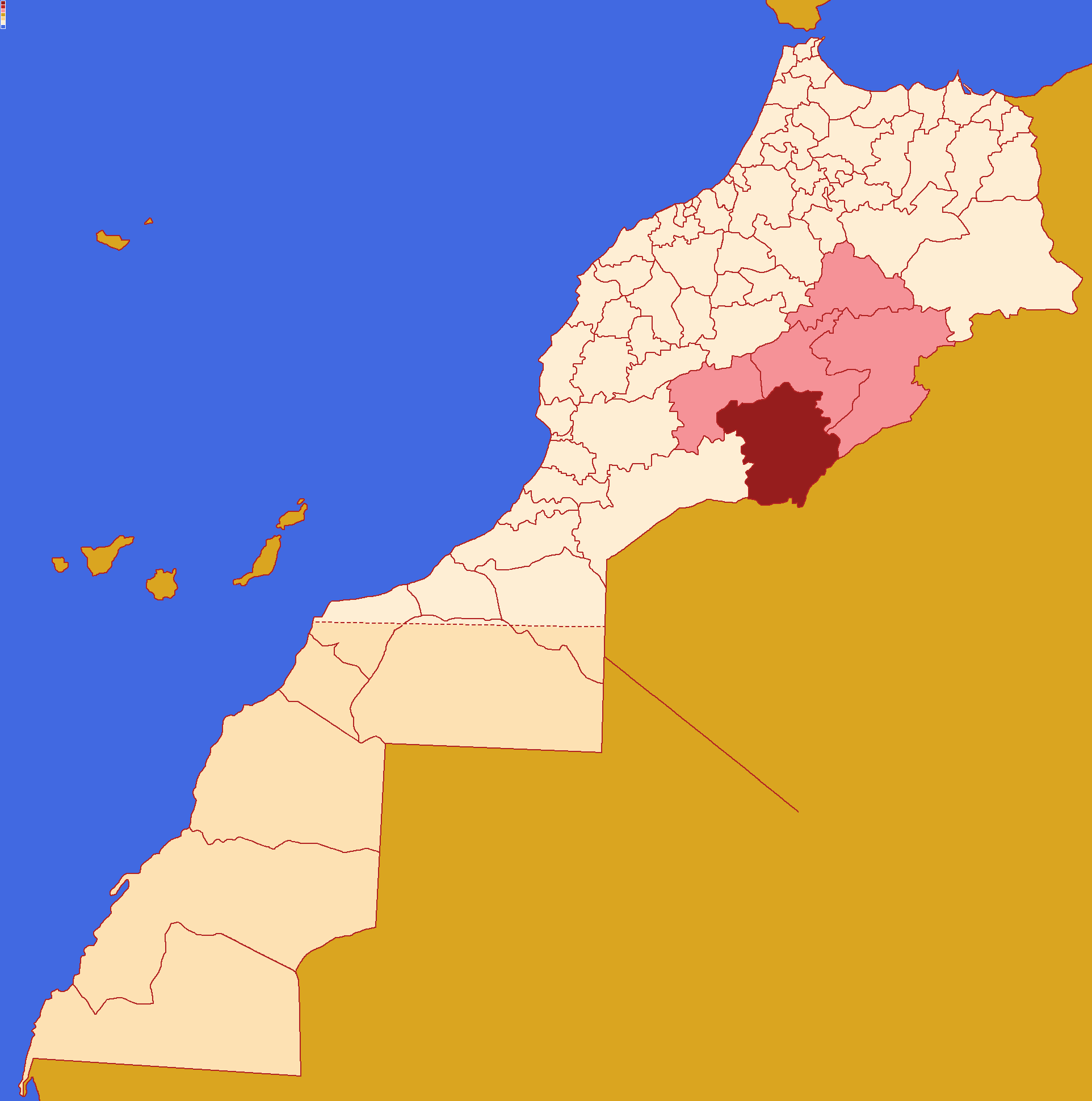 Localização da província de Zagora ,dentro da região de Drá-Tafilete, dentro de Marrocos. Conforme a reforma admistrativa de 2015.